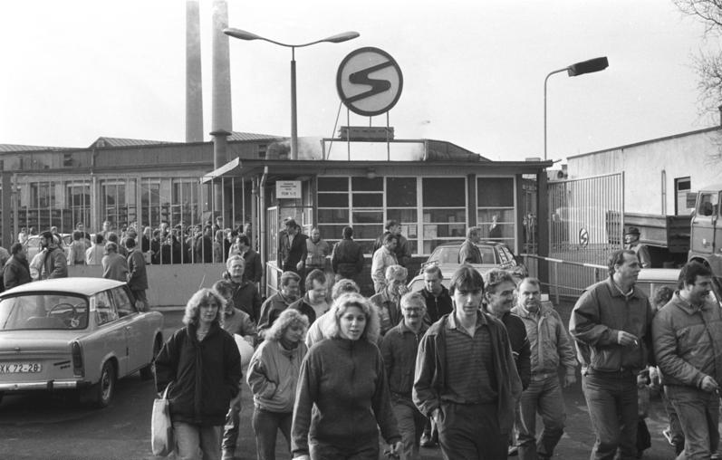 ADN-ZB/Kasper/ 29.11.90/ Zwickau: Belegschaftsversammlung im Sachsenring/ Automobilbauer unterbrachen ihre Betriebsversammlung zur Mittagspause. Bei der Gelegenheit erwarteten sie von der Firmenleitung klare Aussagen über die Zukunft ihrer Arbeitsplätze bei den Sachsenringwerken. Die Versammlung fand unter Ausschluß der Presse und damit der Öffentlichkeit statt.